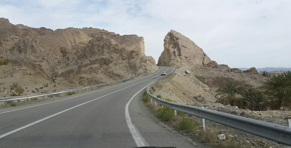 دامن دروازه قرآن